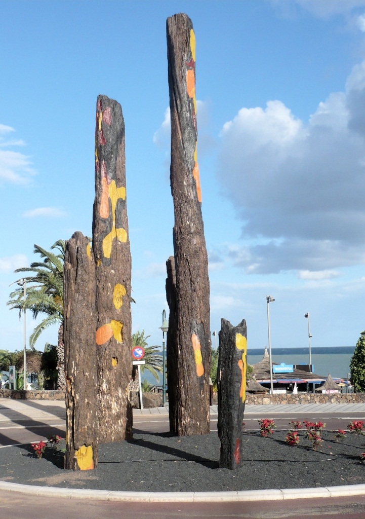 Der spanische Stadtplaner José María Pérez Sánchez gestaltete aus den Baumstämmen der letzten Ladung des Wracks der Temple Hall diese Skulptur, die inmitten eines Wendekreises in Costa Teguise errichtet wurde.